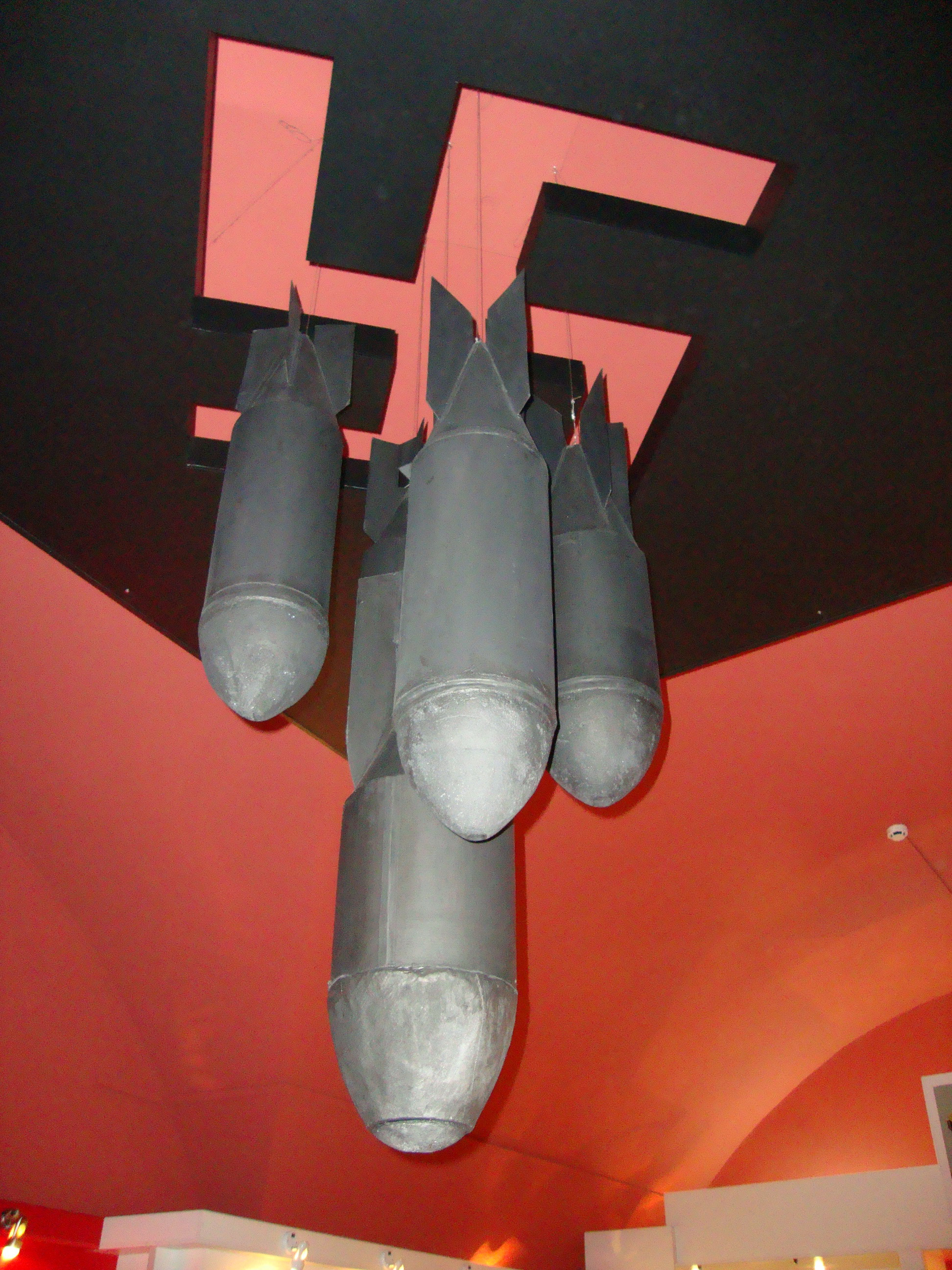 Авиабомба времен ВМВ.